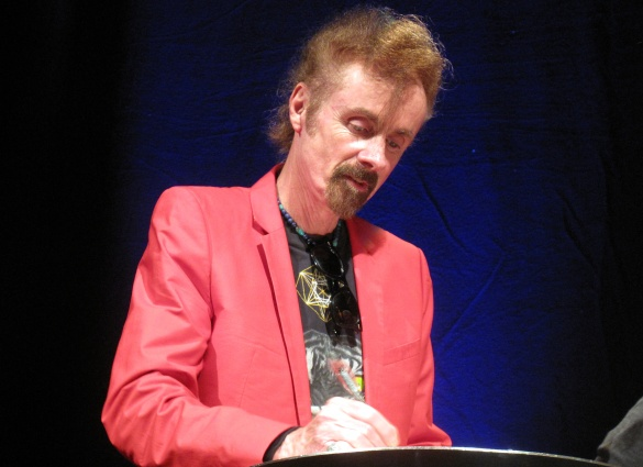 T.C. Boyle liest in der Muffathalle, München.